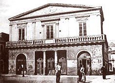 Reggio Calabria - L'antico Real Teatro Borbonio, andato distrutto nell'ultimo terremoto del 1908.